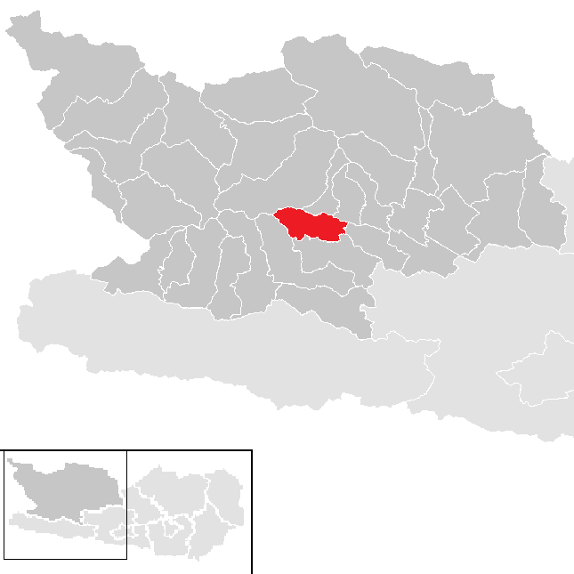 Bezirk Spittal an der Drau